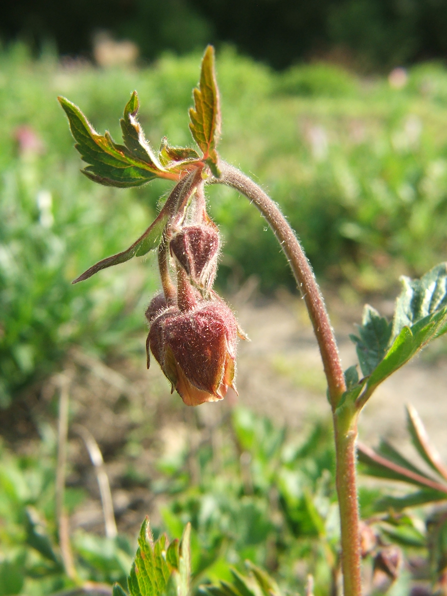 Geum × sudeticum (G. montanum × G. rivale). Syn. Geum × tirolense